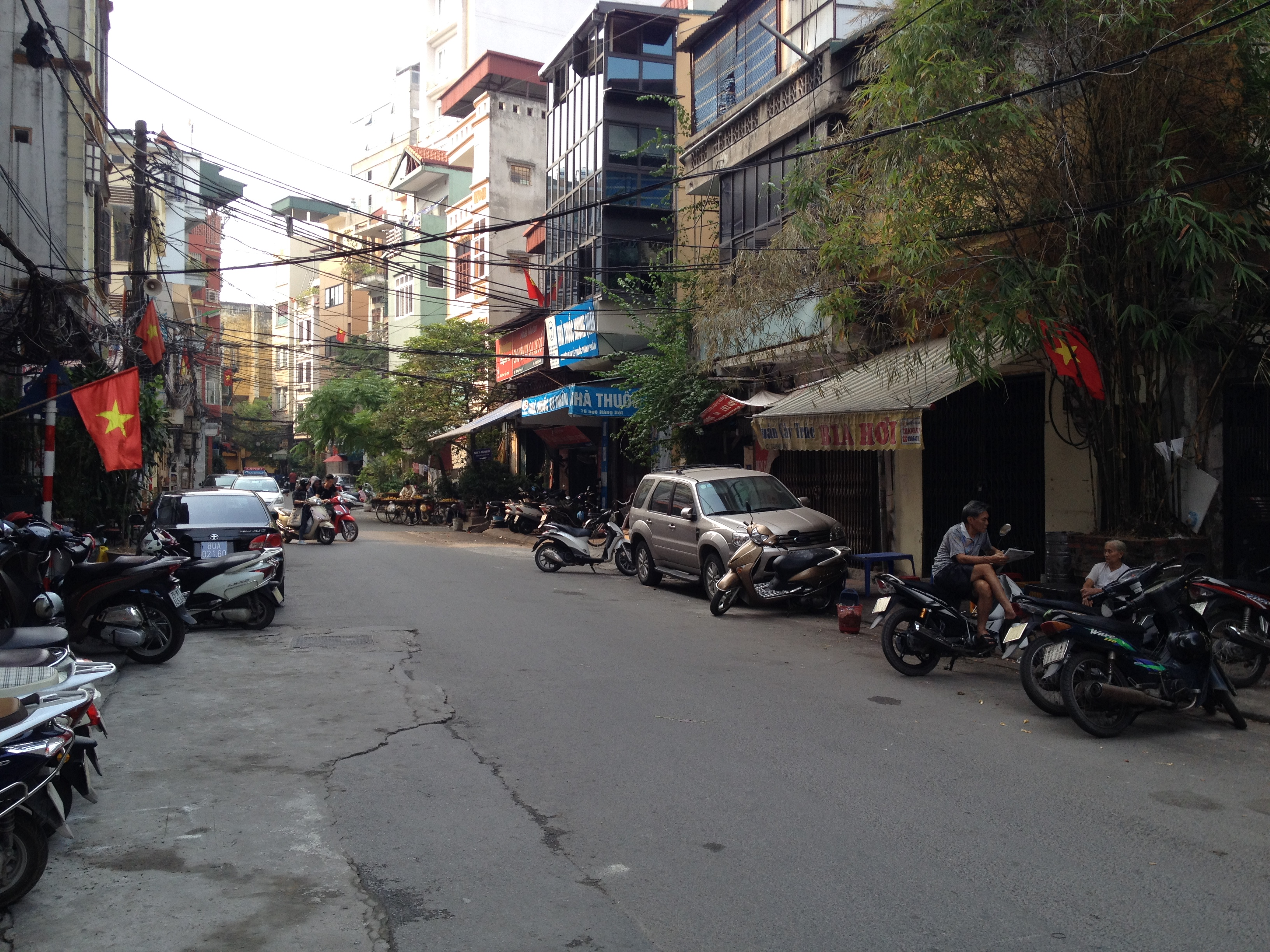 Hà Nội, Việt Nam.